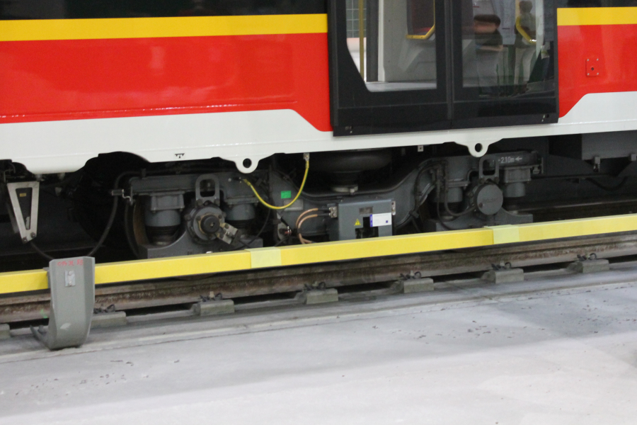 Wózek napędny wagonu numer 4023 pociągu Siemens Inspiro numer 63 stojącego przy peronie planowanej III linii na stacji metra C14 Stadion Narodowy.